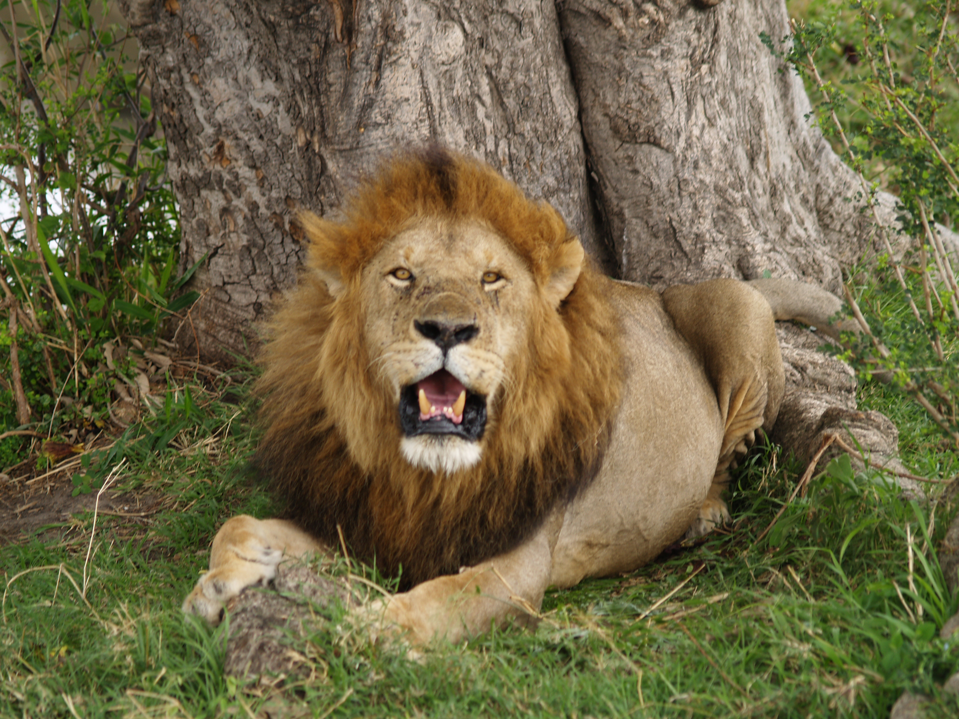 Male East African lion at Masai Mara, Kenya